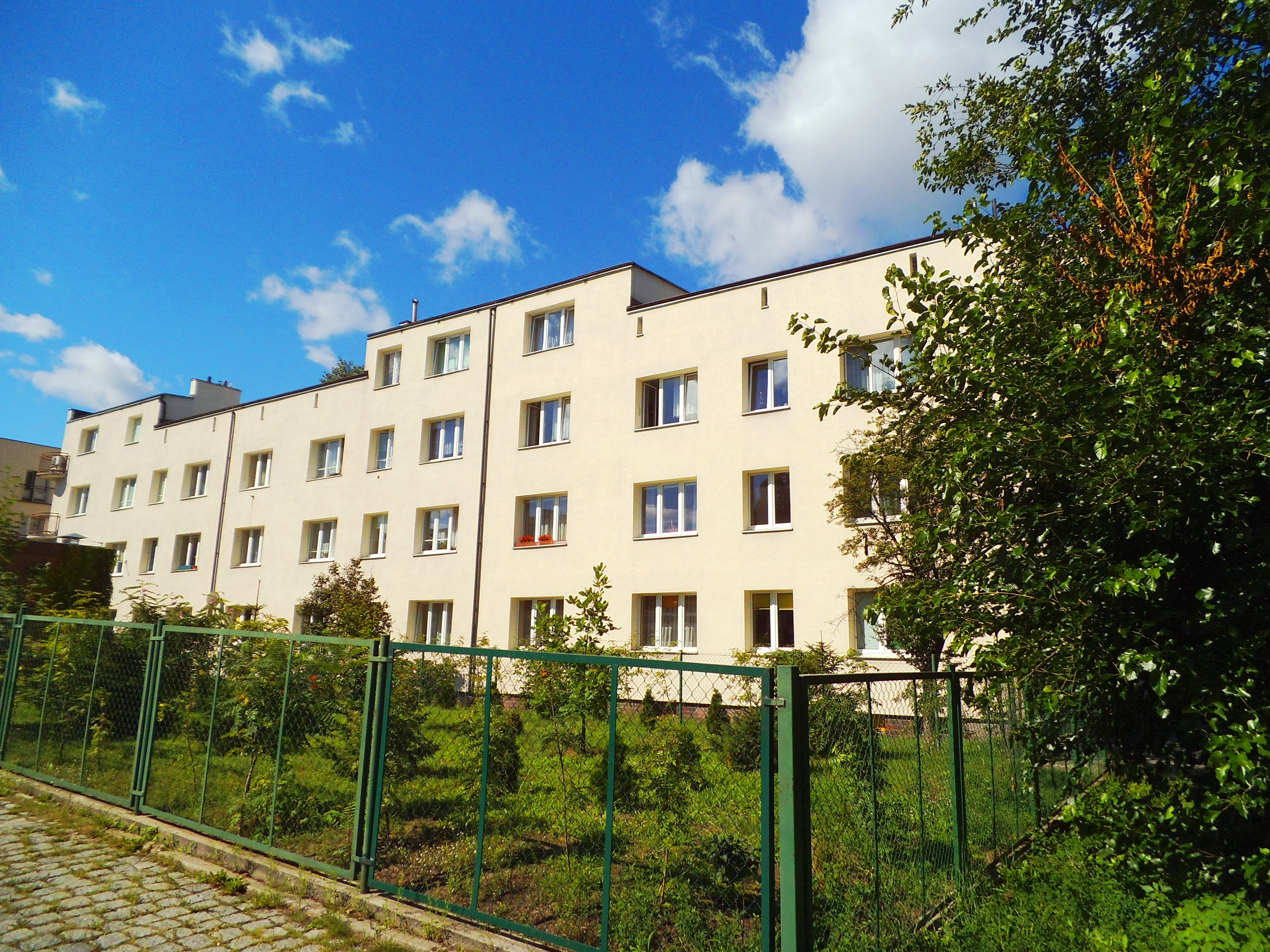 Dom przy ul. Mickiewicza 23 w Toruniu